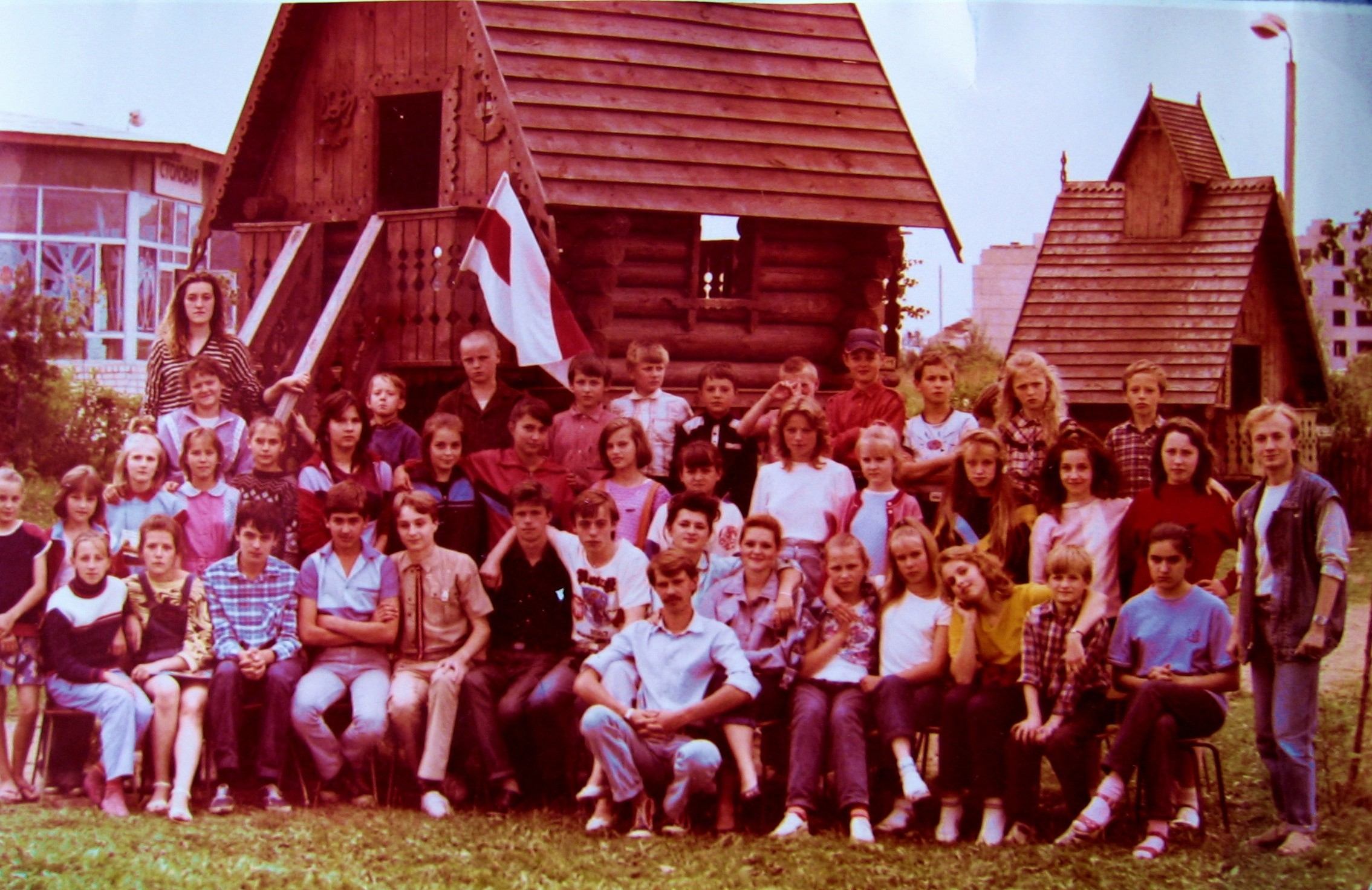 Беларуская (тарашкевіца): Старэйшая харугва, 1990. Крайні справа — старэйшы завадатар Алесь Шалевіч. Унiзе ў цэнтры завадатар Вадзiм Чарнышоў, зьлева за iм Алег Грушэцкi, лявей Арцём Чарнышоў, лявей Мiкола Гракаў, лявей Антось Кузьміч, сядзiць другая зьлева – Юлiя Качанава.